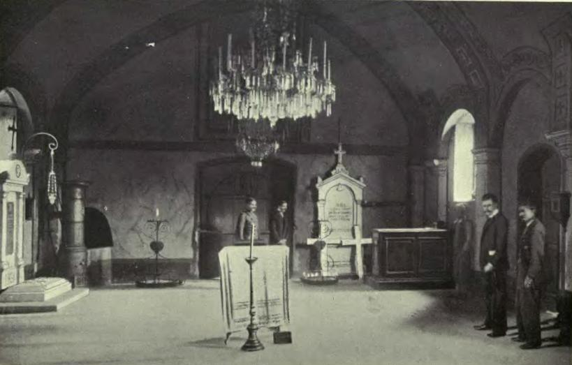 Tumbas de Alejandro I y Draga en la iglesia de San Marcos, Belgrado.